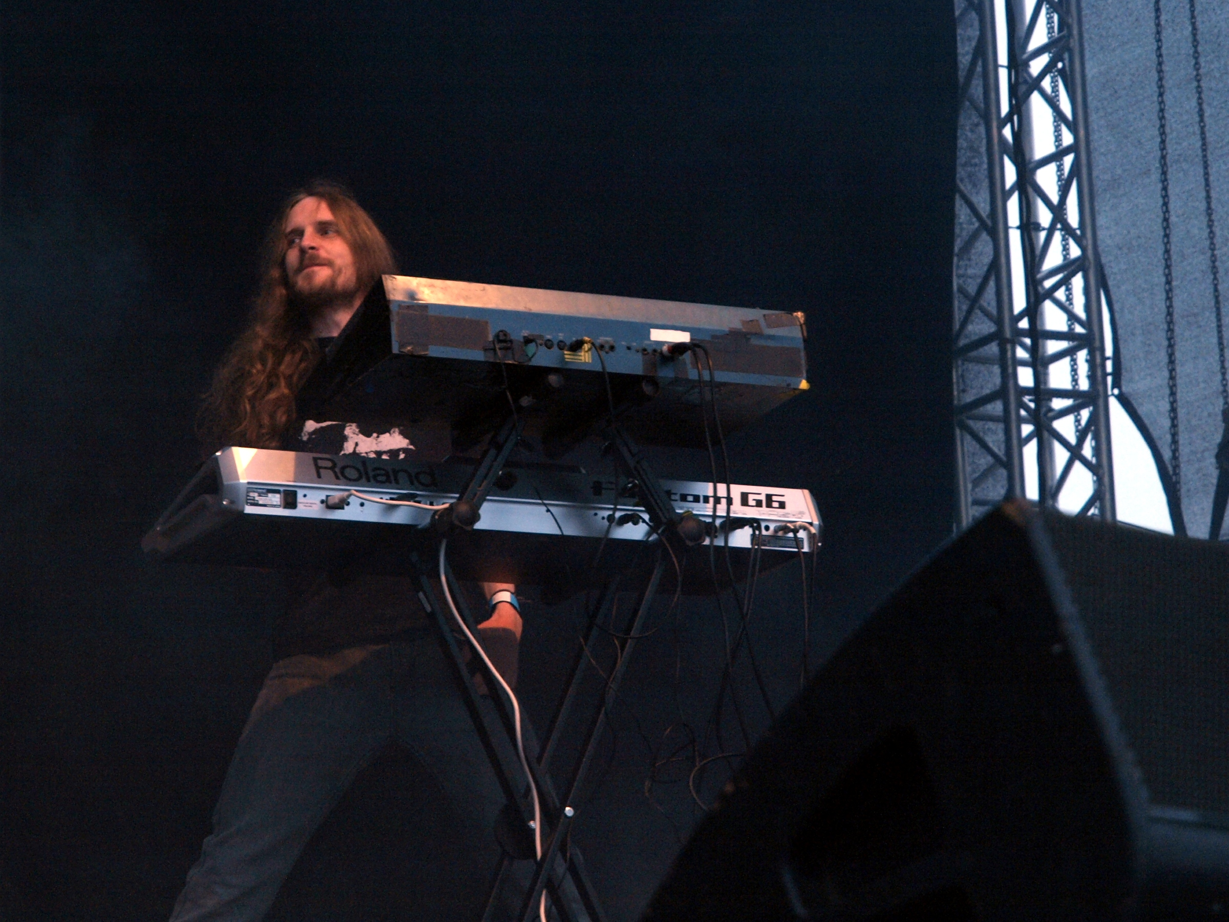 Soilwork live am Myötätuulirock 2011